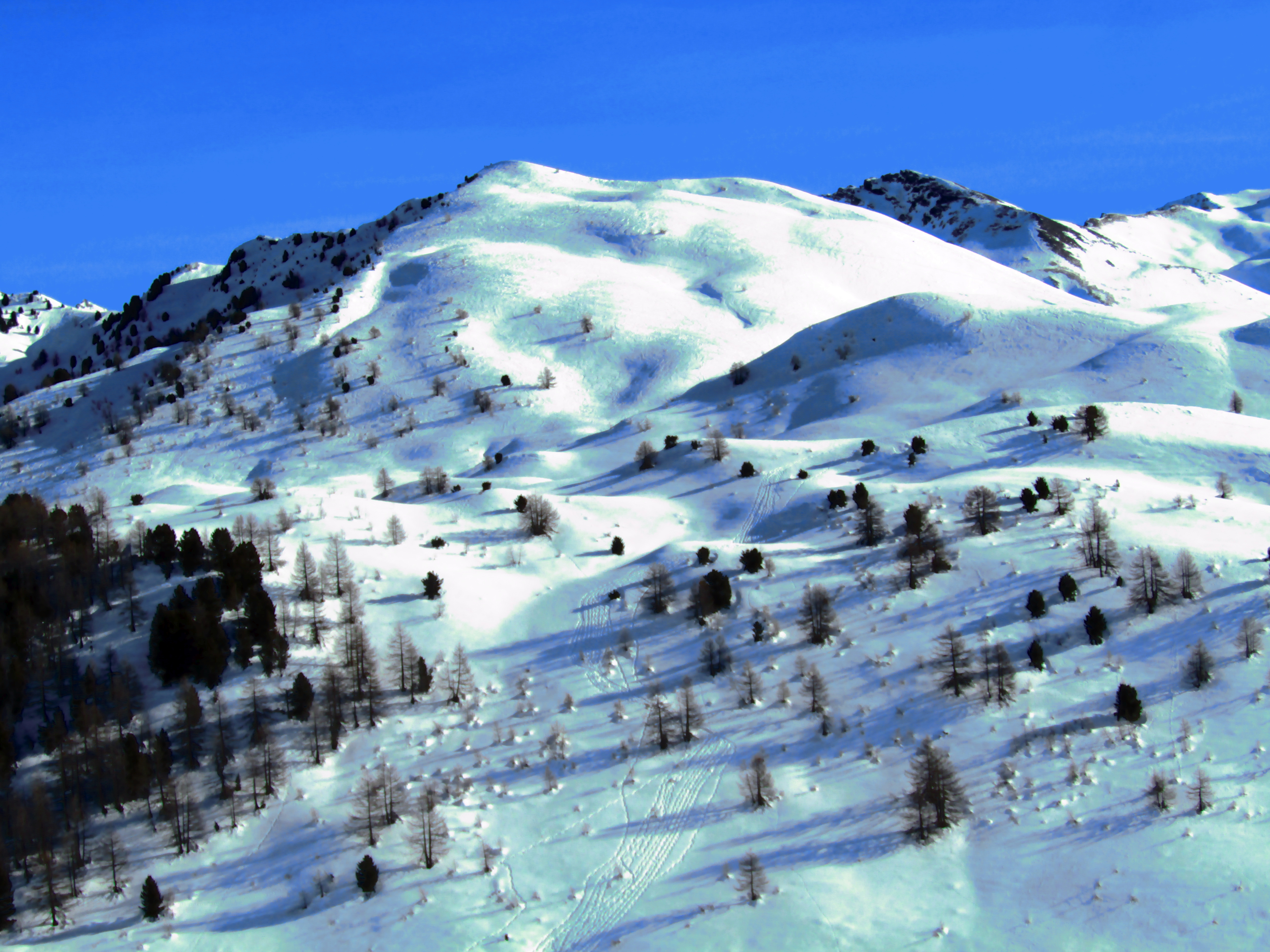 La cima Fournier (Alpi Cozie) vista da Poggio Carabinieri (o Poggio di Col Bousson)